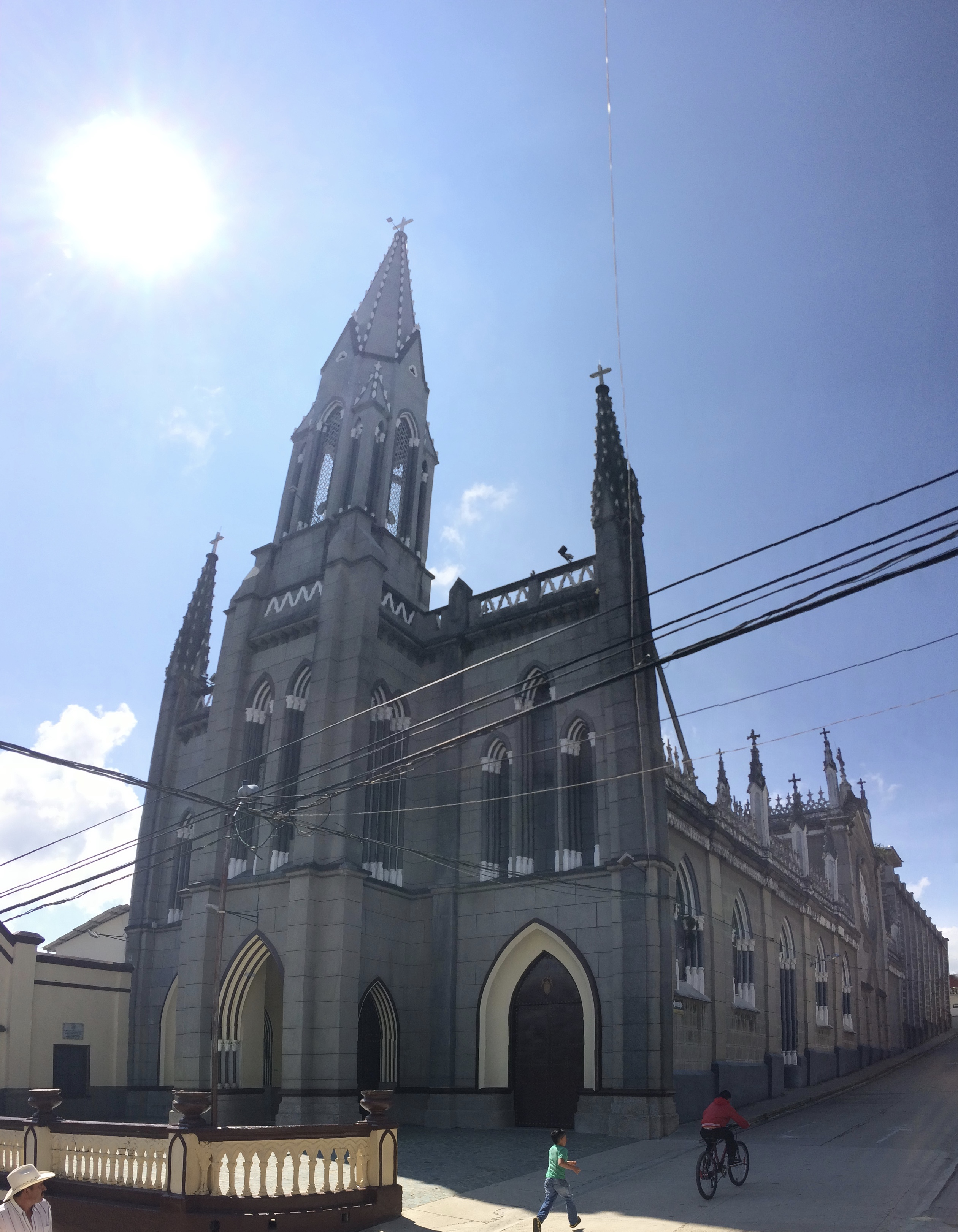 Perspectiva de la fachada de la Iglesia del Carmen en Sonsón.